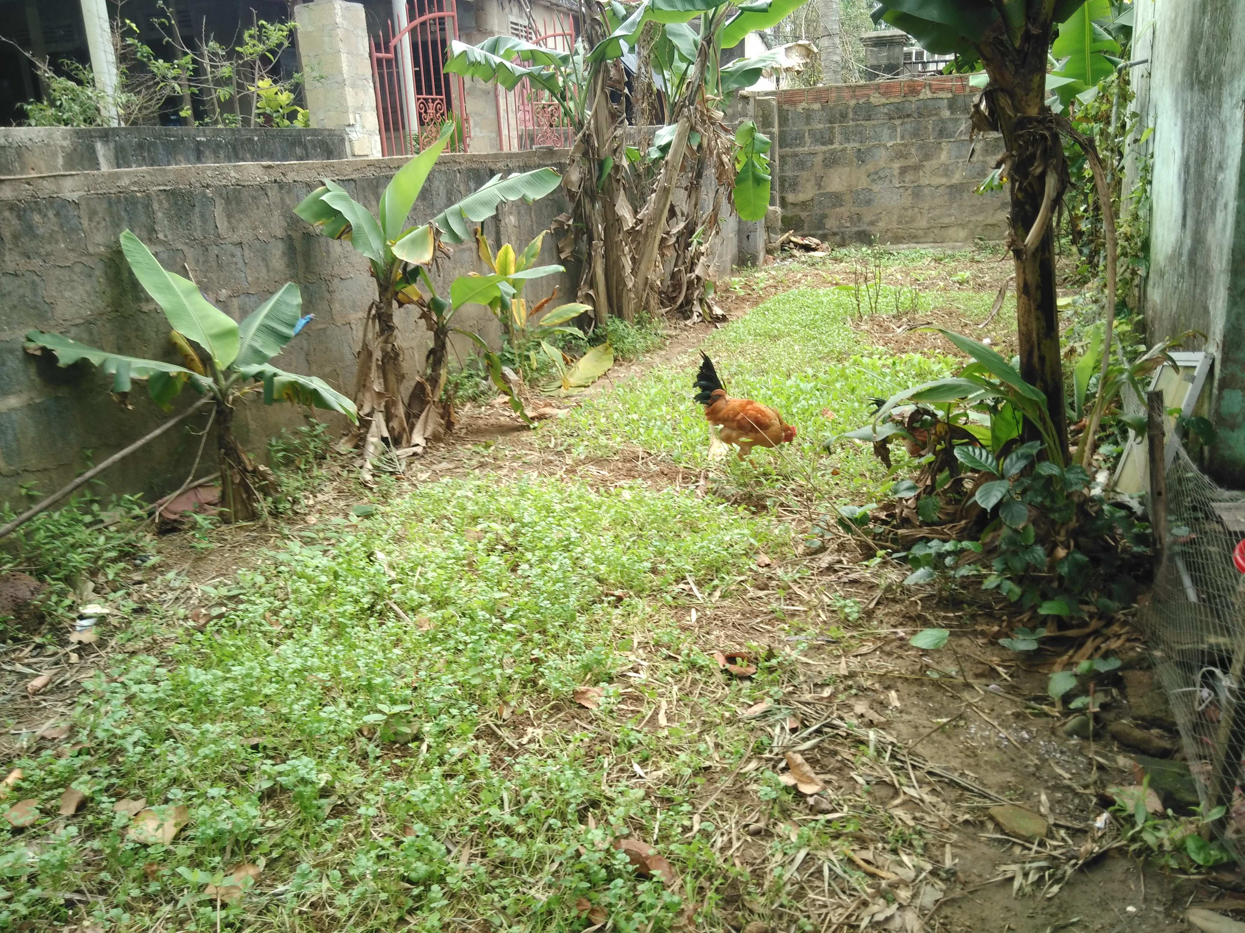 Gà ta vàng